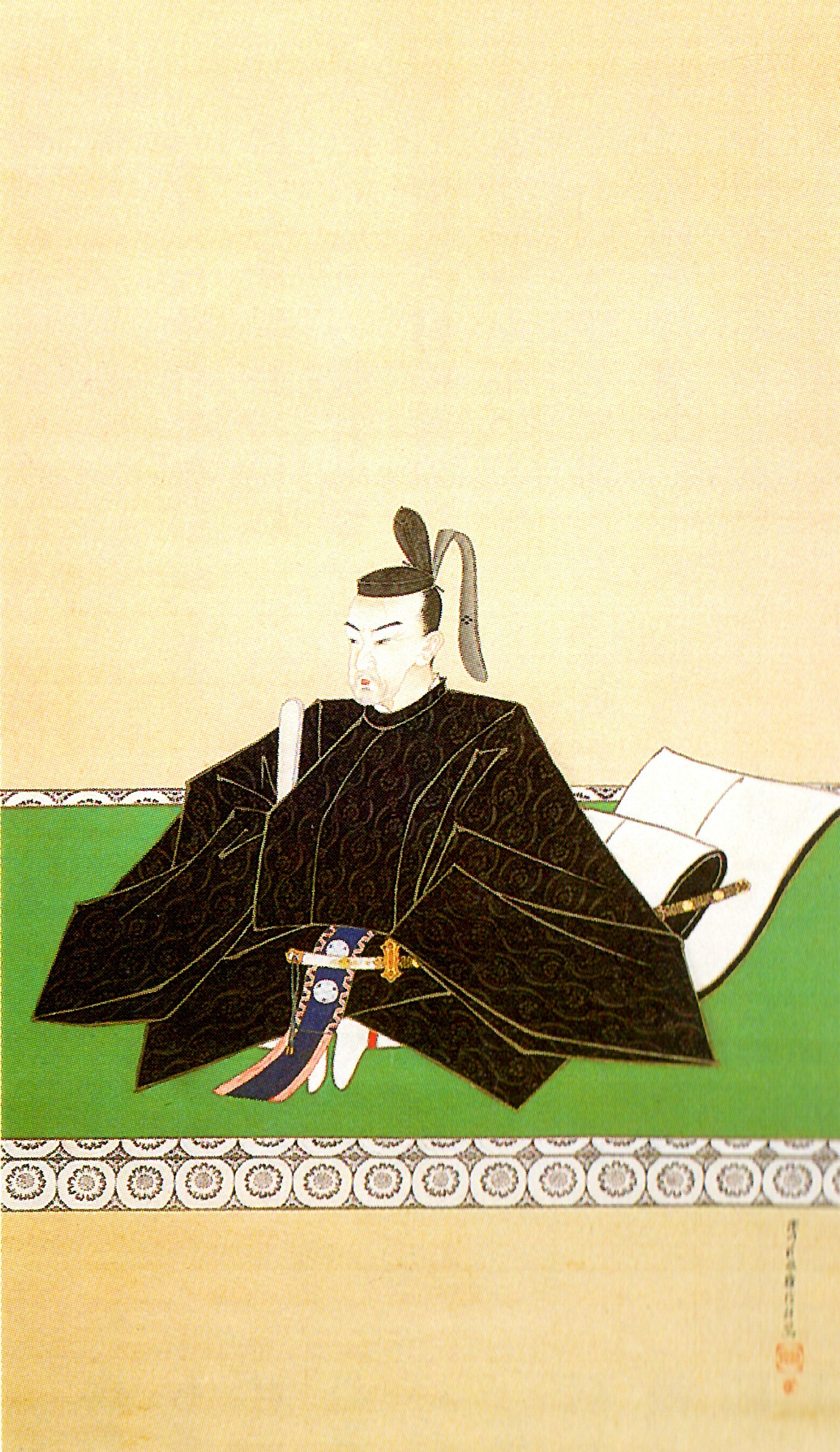 松平容敬の肖像。